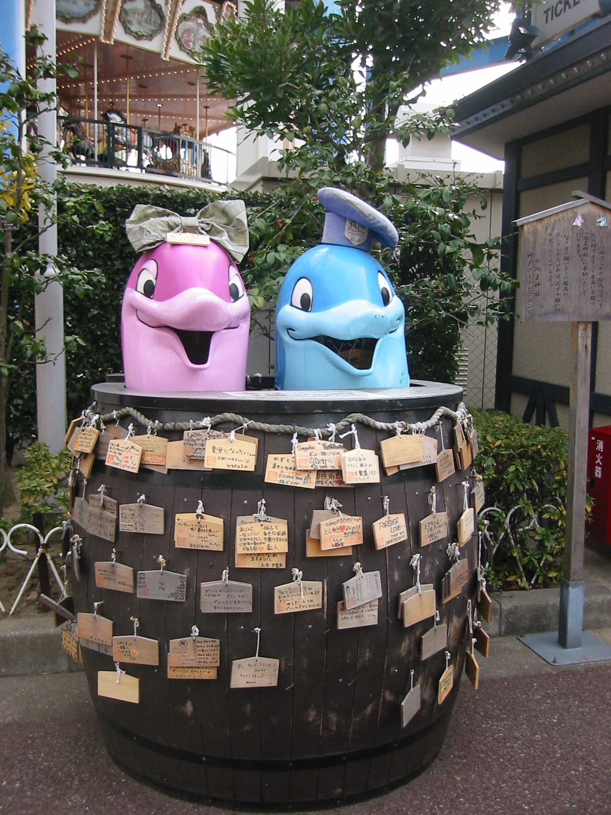 神戸ポートピアランドの「願いをかなえタル」 樽に絵馬を飾ると京都「地主神社」に絵馬が奉納され願いが叶うとされるKobe Portopia Land on Port Island, disassembled in August 2006